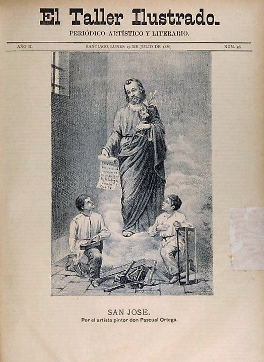 La revista reproduce el cuadro San José de Pascual Ortega en un grabado de autor desconocido. Fundado en Santiago por el escultor José Miguel Blanco, este semanario fue una publicación pionera en la difusión y crítica del arte nacional, hecha por artistas y para artistas